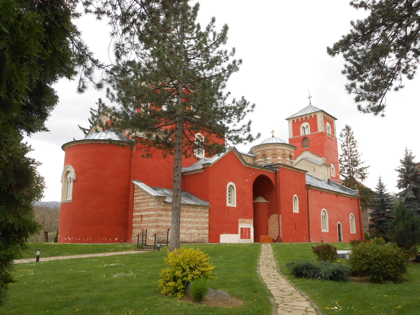 Manastir Žiča